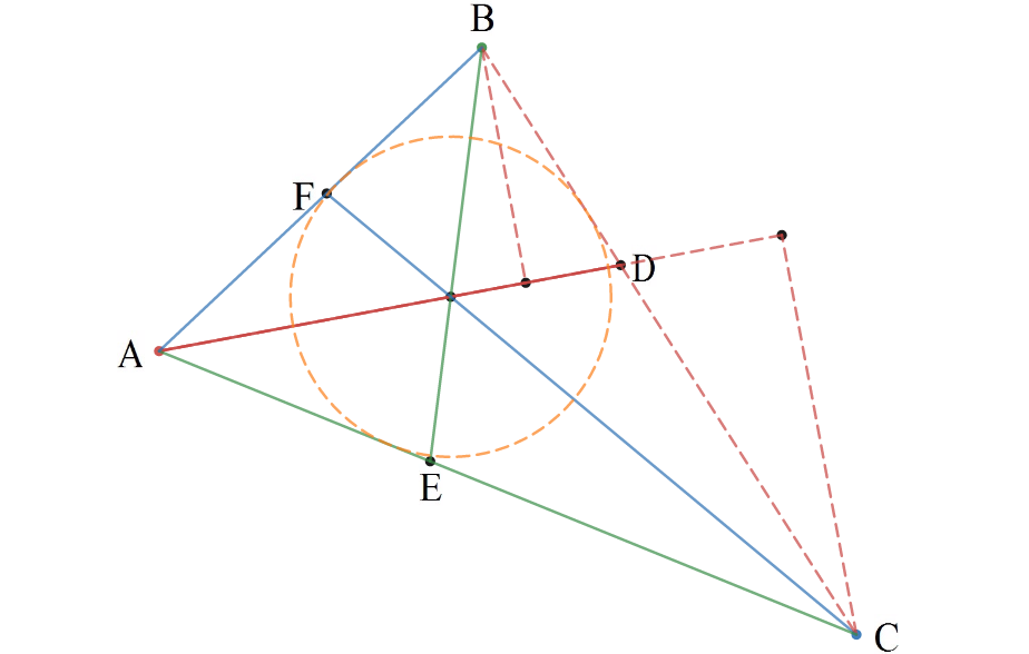 Vinkelhalvering figur 1 NEW